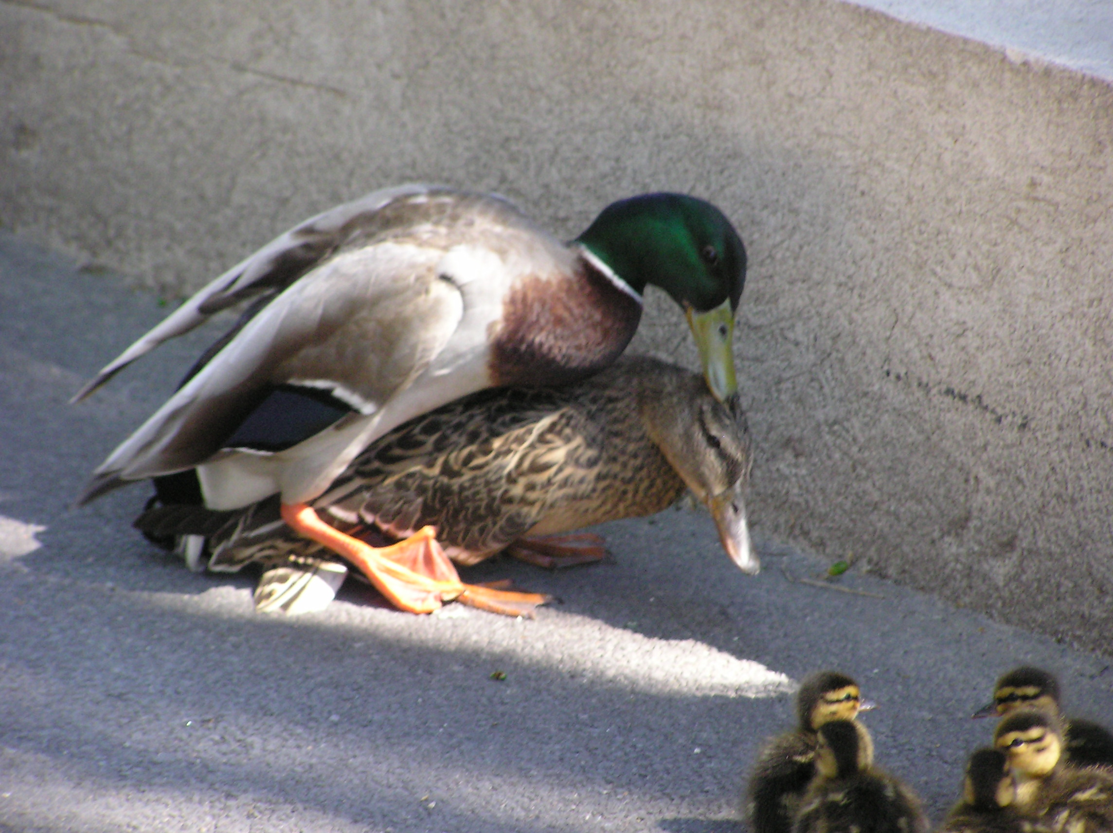 accouplement canards col vert